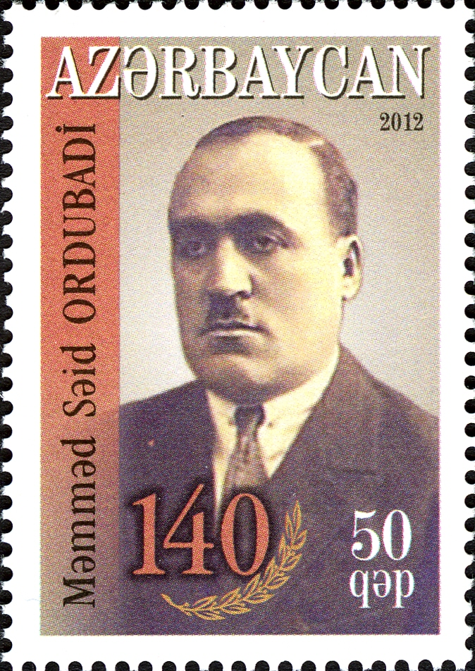 Məmməd Səid Ordubadinin 140 illiyinə həsr olunmuş marka.